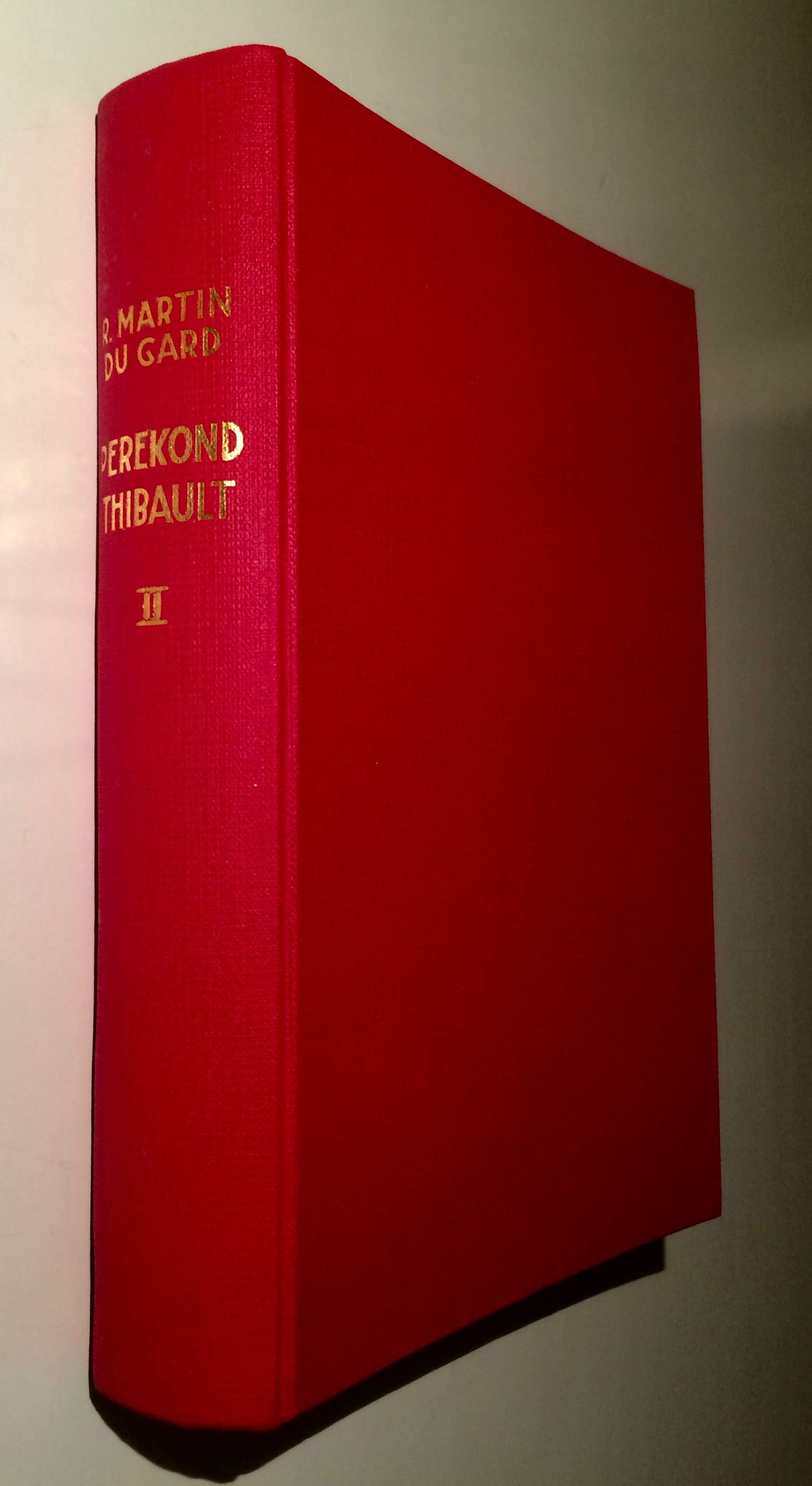 Raamatukogu- või tavaline kõvaköide